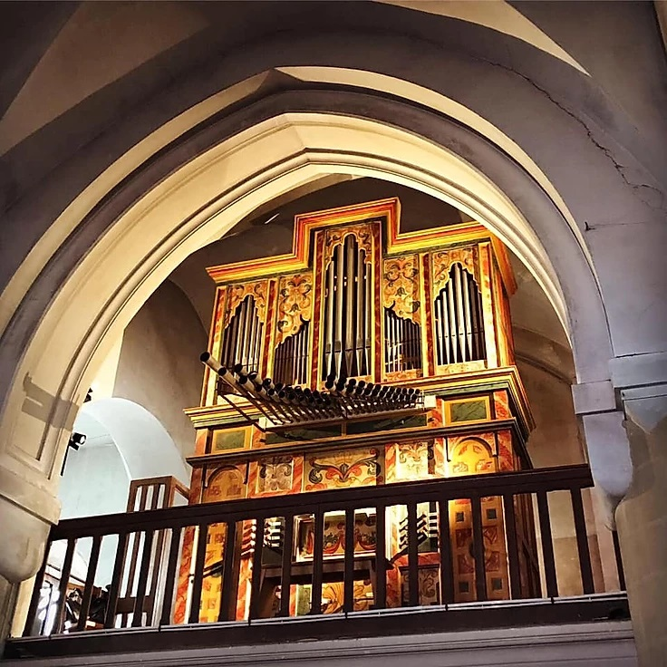 Orgue de Buenafente del Sistal, en l'église Saint-Eloi deFresnes